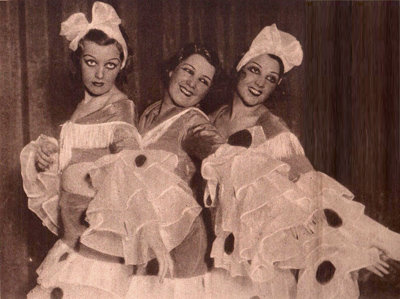 Libertad Lamarque y otras actrices de su época en el Teatro Maipo, 1933